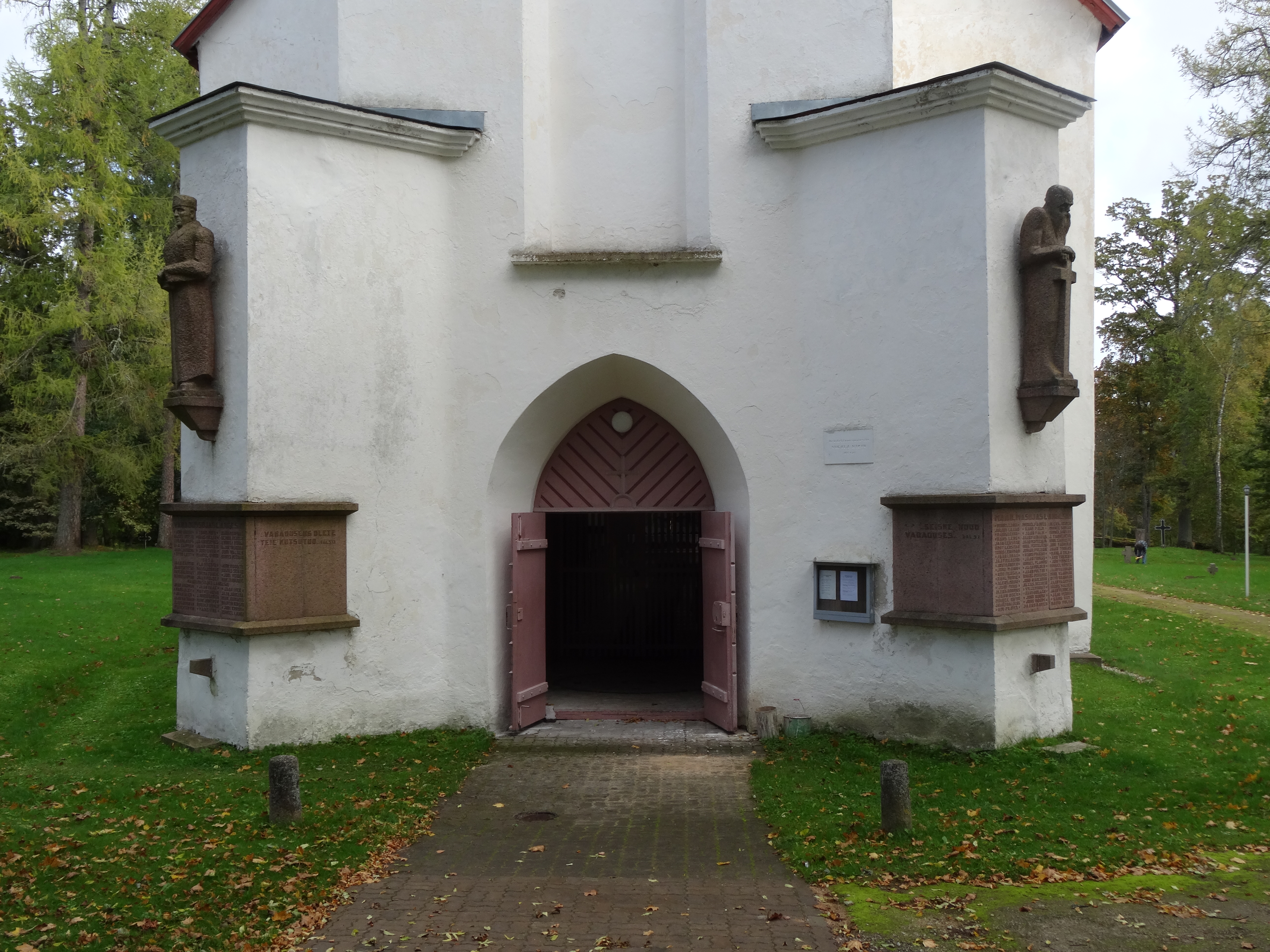 Vigala kirku sissepääs